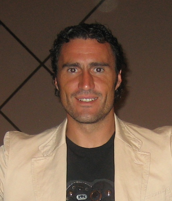 Antoni Jiménez Sistachs, Toni.